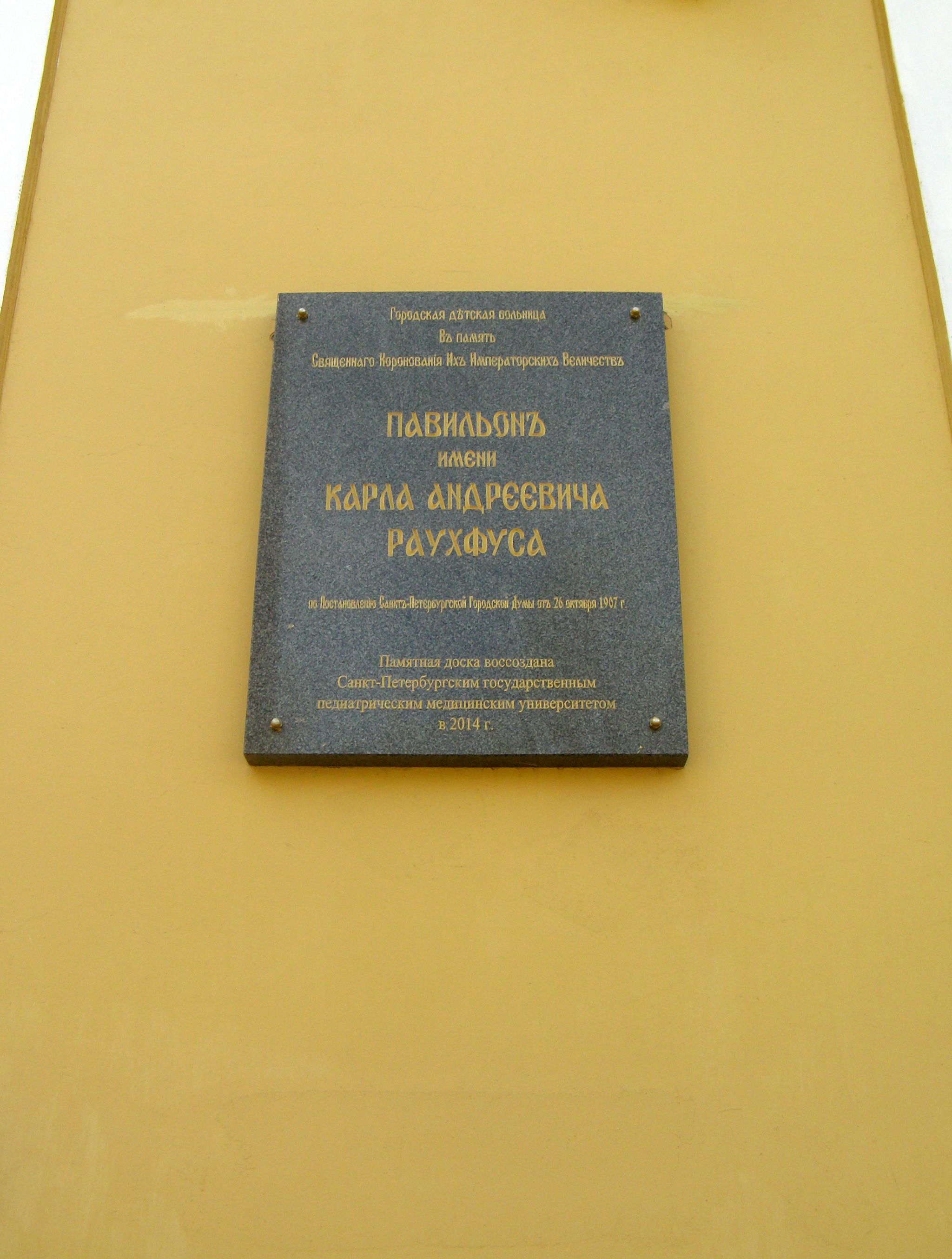 Детская больница в память Священного коронования Их Императорских Величеств. Павильон инфекционного отделения: Литовская улица, 2 литера И, Выборгский район, Санкт-Петербург